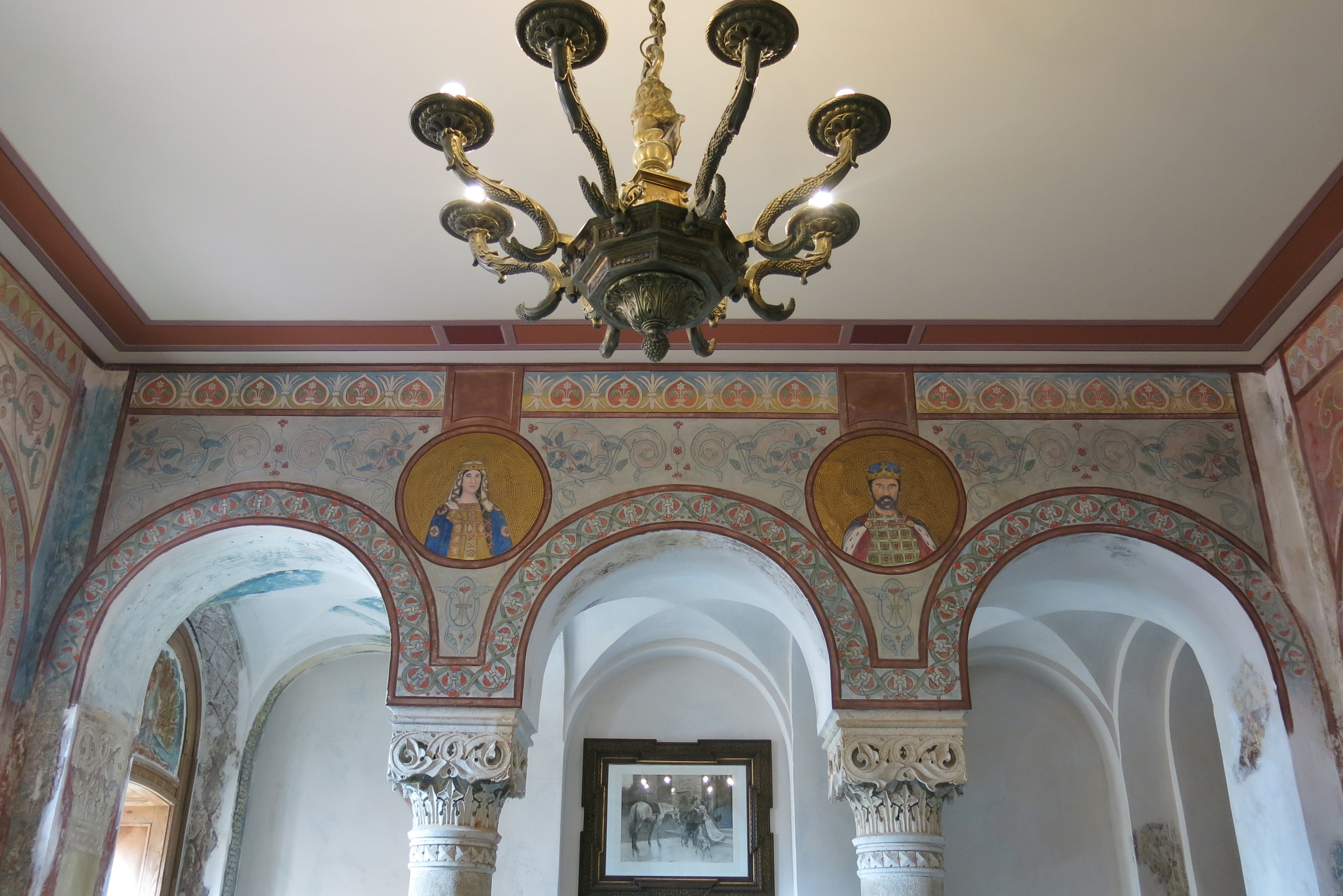 Neues Schloss, Schloss Rotenturm, Vestibül im OG mit flacher verputzter Decke, über den Bogenstellungen ornamentale Zierformen, in den Zwickeln Medaillons mit Portraits